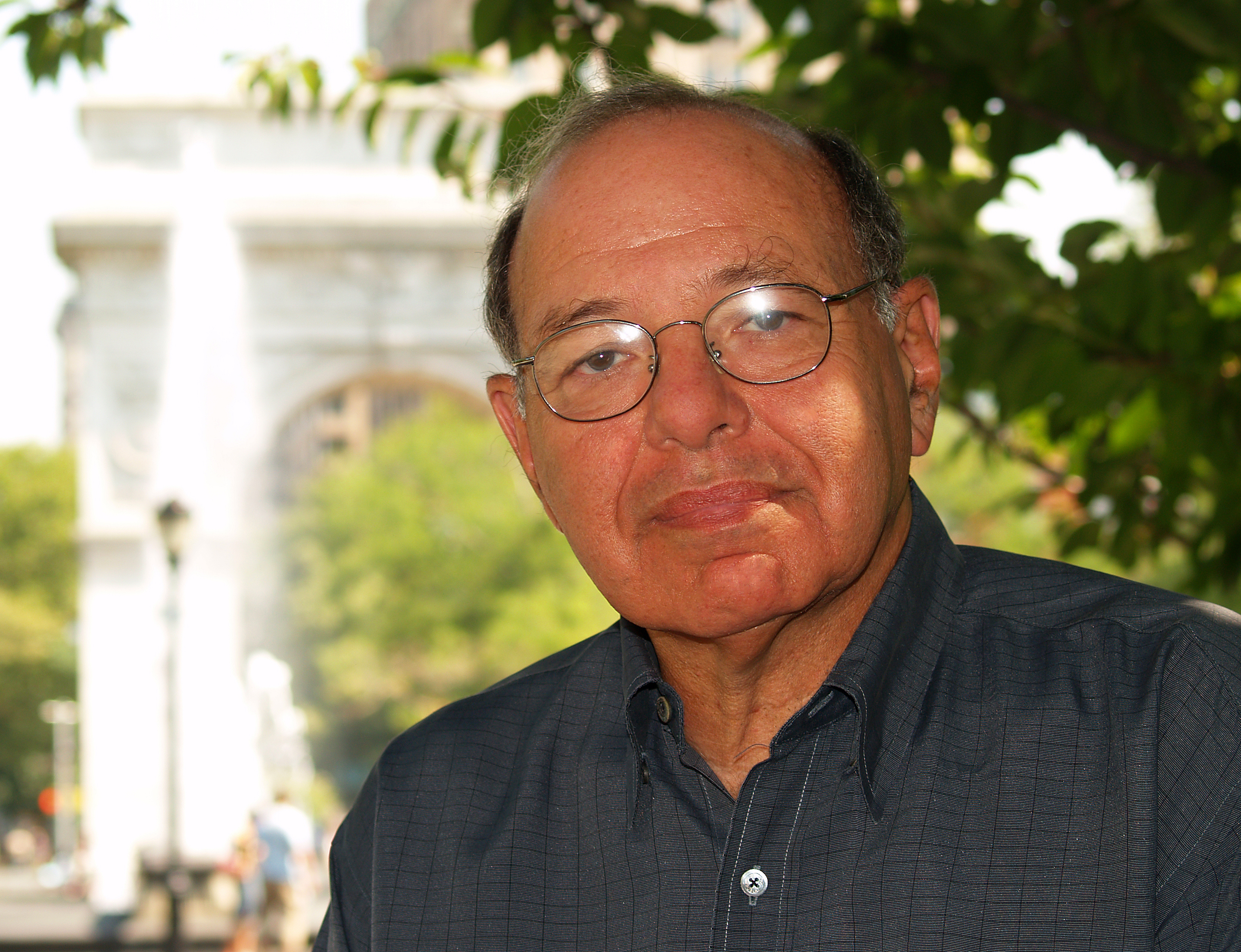 Burt Neuborne